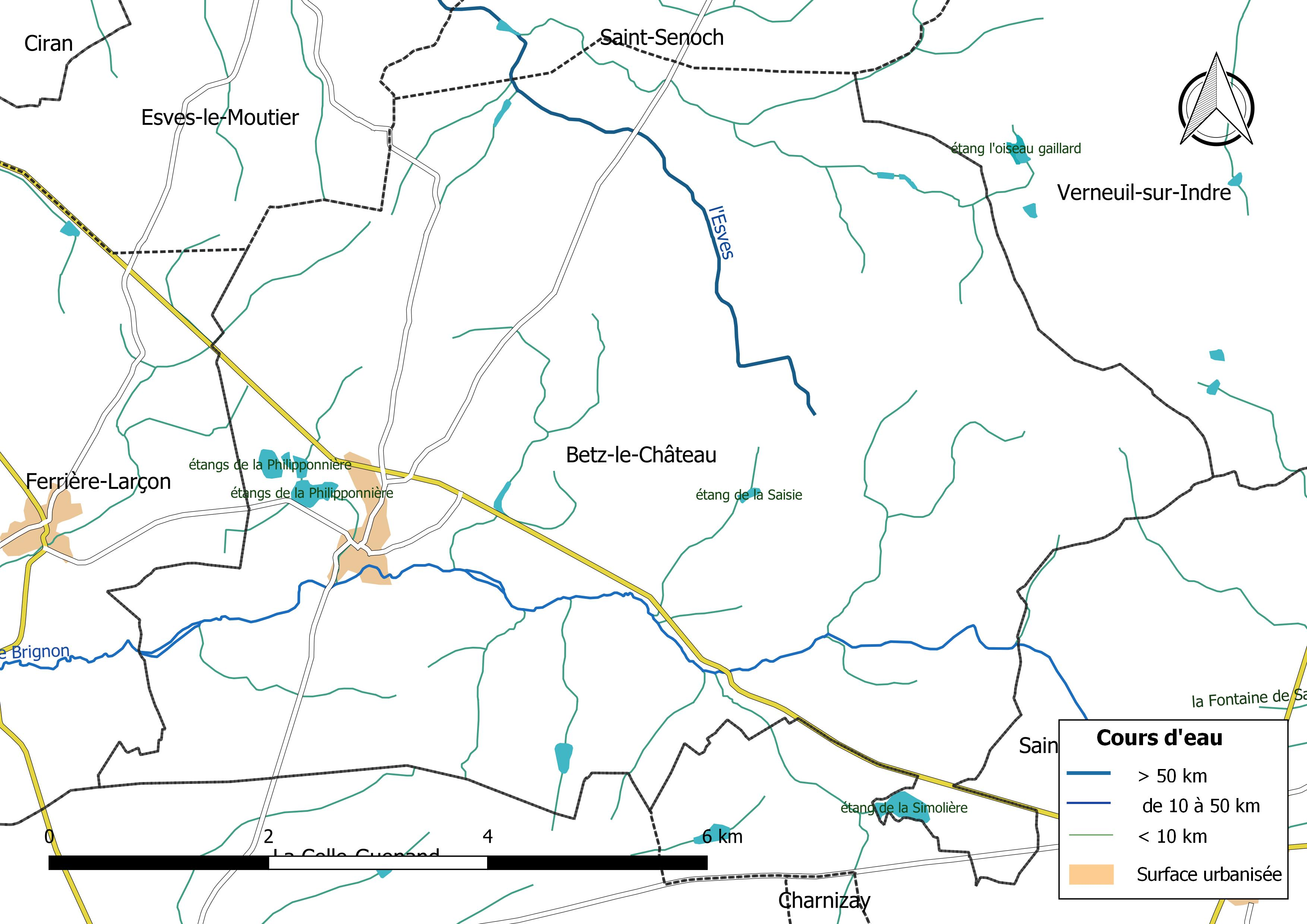 Carte du réseau hydrographique de la commune de Betz-le-Château (France).